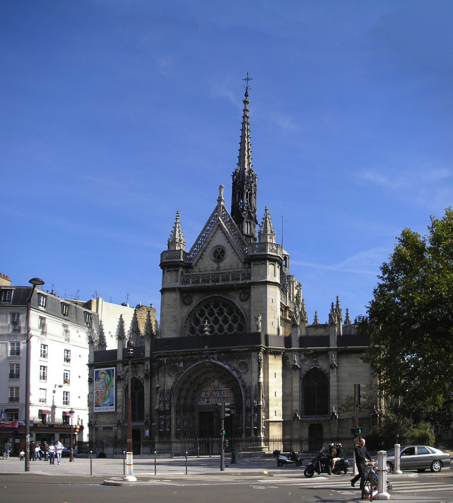 Église Saint-Laurent (Paris)